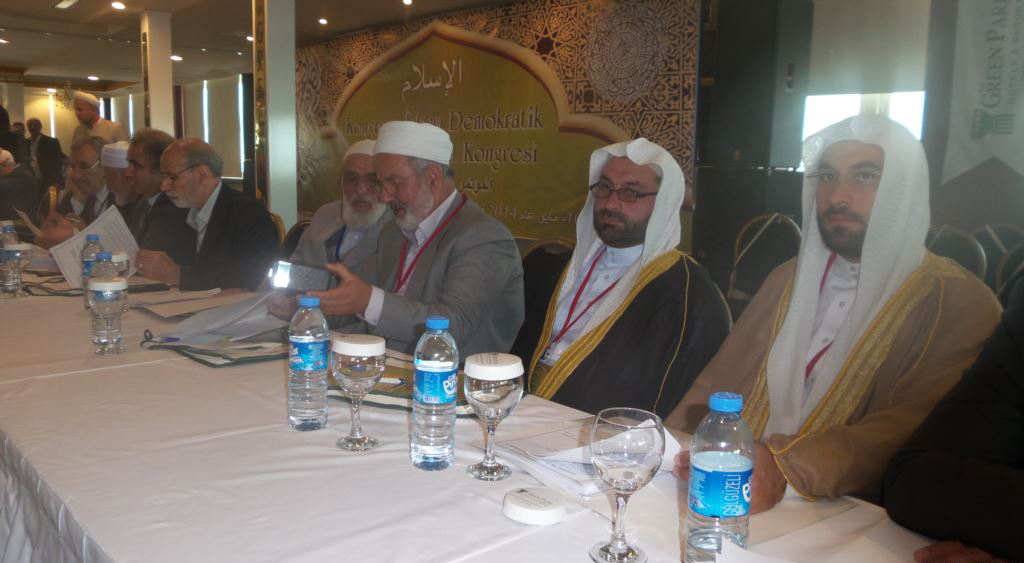 Abdullah Öcalan'ın çağrısıyla 10-11 Mayıs 2014 tarihlerinde gerçekleşen ilk Demokratik İslam Kongresi'nden bir kare.